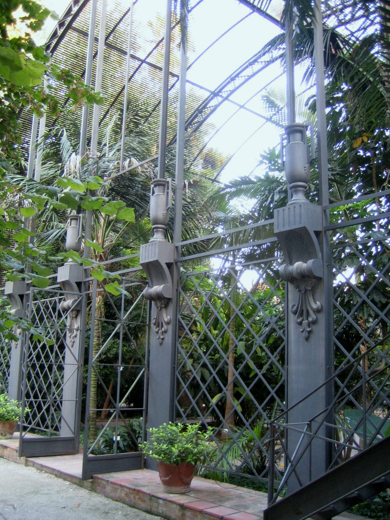 Inveradero del Jardín Botánico de Valencia. España.